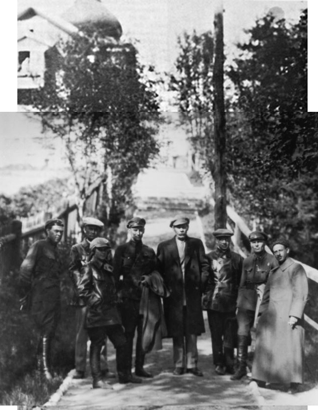 Максим Горький на Соловецкого концлагеря (Секирной горе) в окружении чекистов. Глеб Бокий стоит слева от Горький.